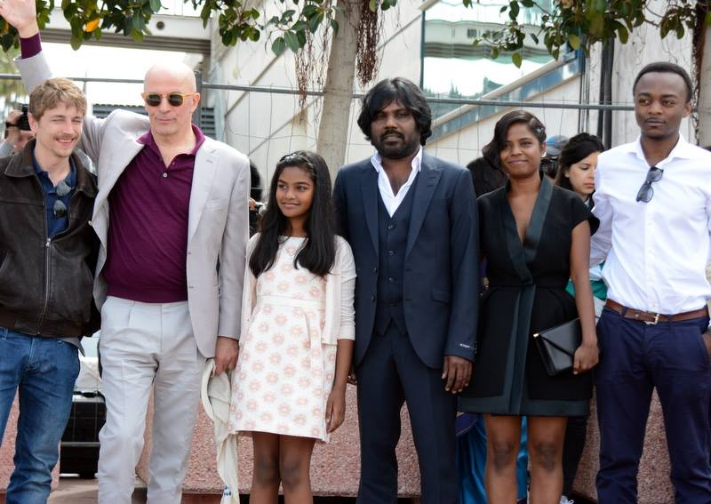 L'équipe de "Dheepan" au festival de Cannes : de gauche à droite, Vincent Rottiers, Jacques Audiard, Claudine Vinasithamby, Antonythasan Jesuthasan, Kalieaswari Srinivasan, Marc Zinga.